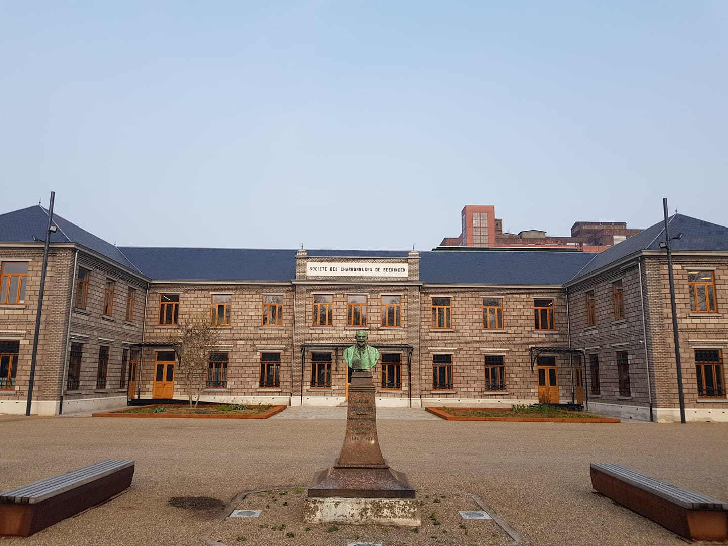 Het hoofdgebouw van de koolmijnsite in Beringen.